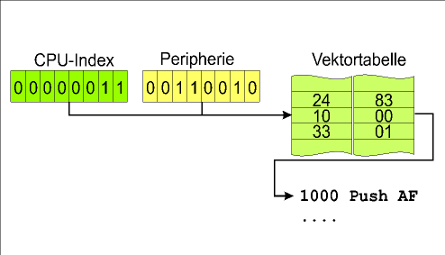 Z80 Interrupt Vektor Tabelle